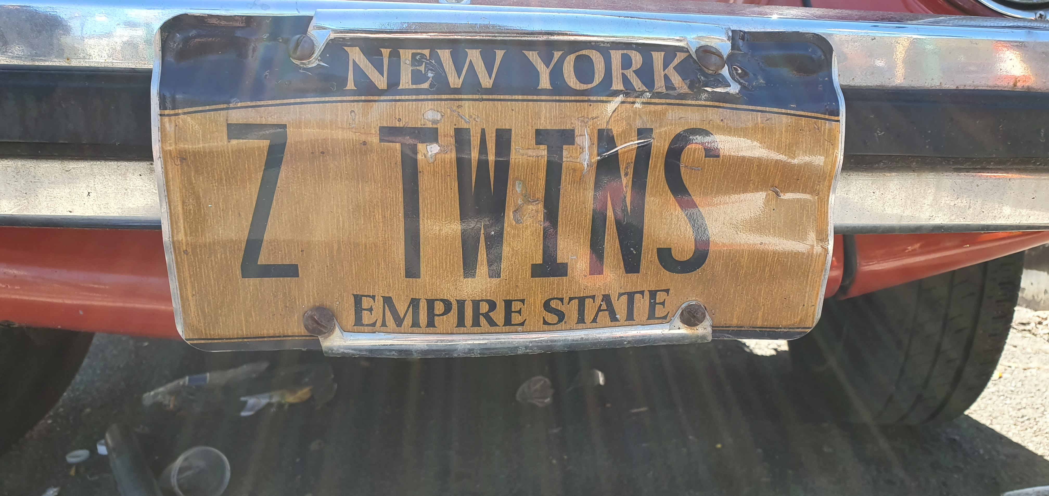 לוחית רישוי בהזמנה אישית